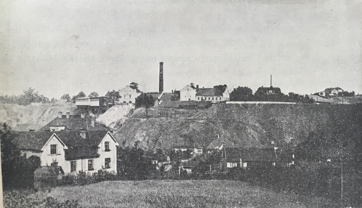 Důl Ema a Lucie v roce 1928